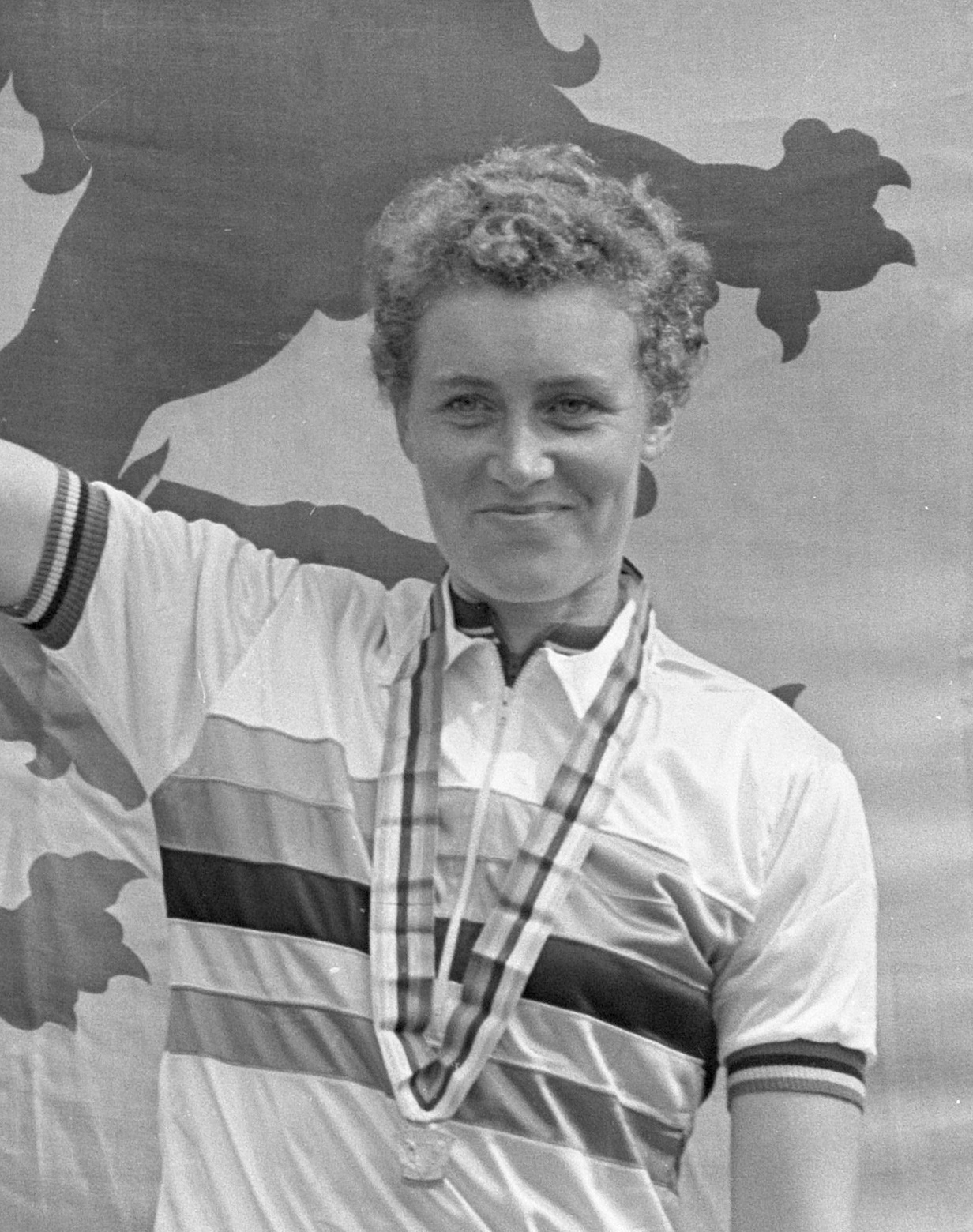 WK Wielrennen, Beryl Burton